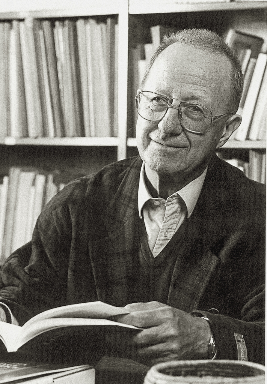 Hansjakob Seiler, 1959 bis 1986 Lehrstuhl in Köln